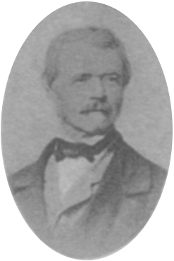 Porträt von Eduard von Kausler.